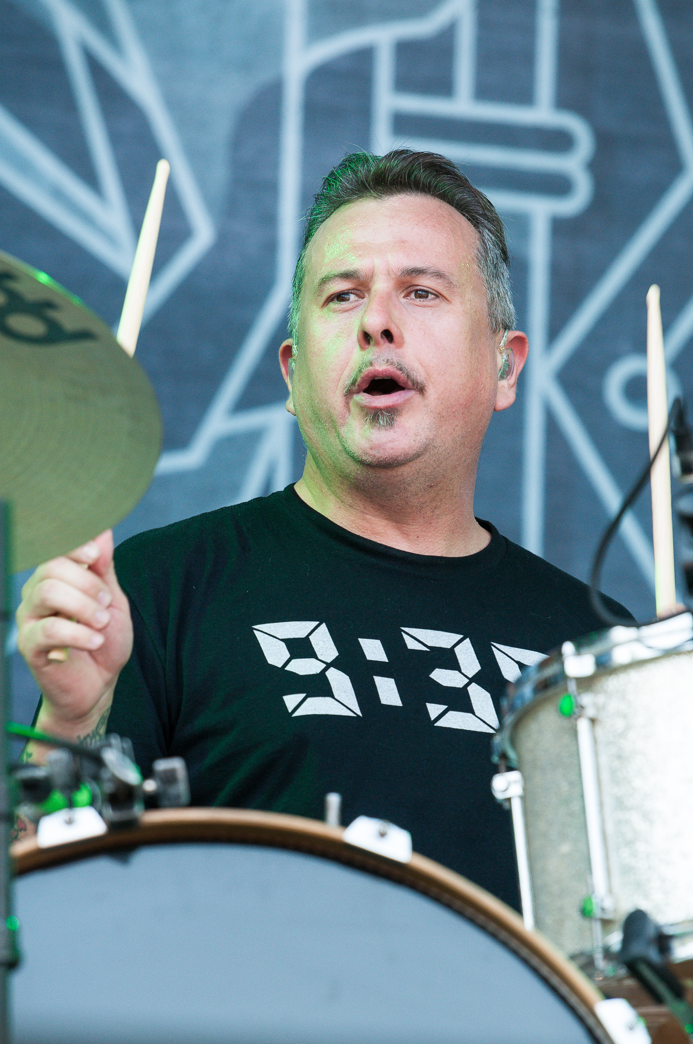 ARGO-Konzerte,Beck's Park Stage,Clutch,Festival,Jean Paul Gaster,Konzert,Livekonzert,Livemusik,Musik,RiP,Rock im Park 2015